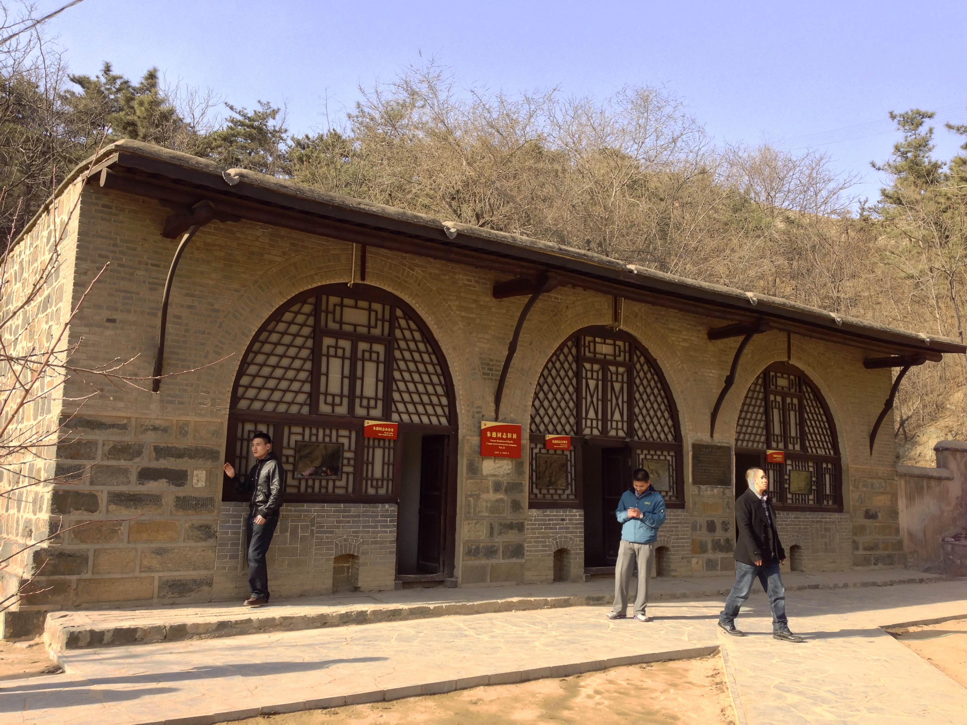 朱德舊居